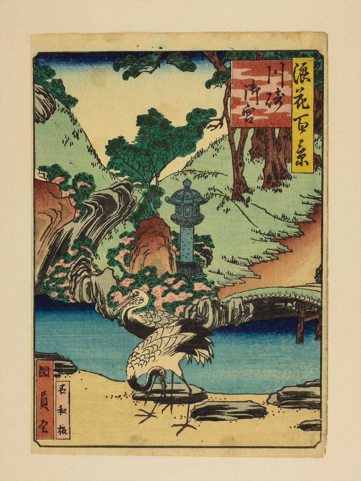 1800年代。歌川國員/画。浪花百景 102枚のうちの1枚。大阪市立中央図書館蔵。